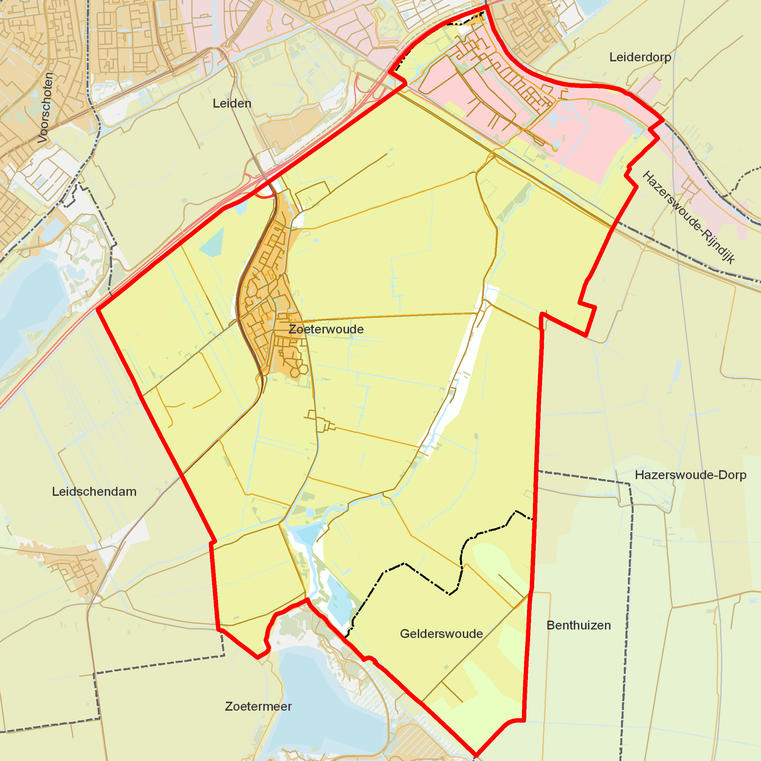 BAG woonplaatsen - Gemeente Zoeterwoude.png